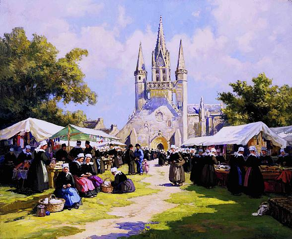 Pardon de Saint-Fiacre, Bretagne [La chapelle Saint-Fiacre se trouve au Faouët (Morbihan)]